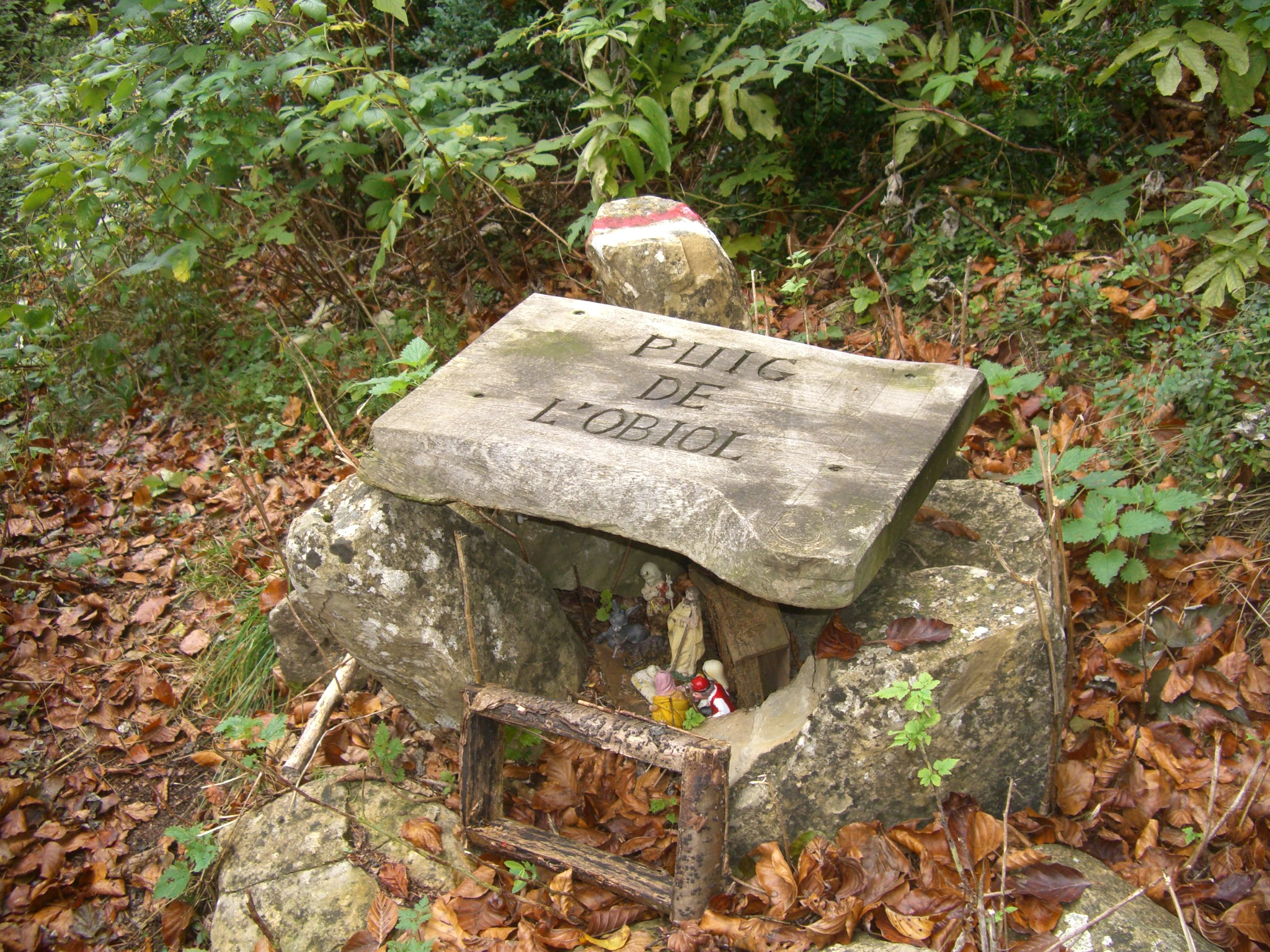 Cim del Puig de l'Obiol (1.544m), amb un pessebre, a la Serra de Milany, a mig camí entre Osona i el Ripollès (Catalunya, Països Catalans)